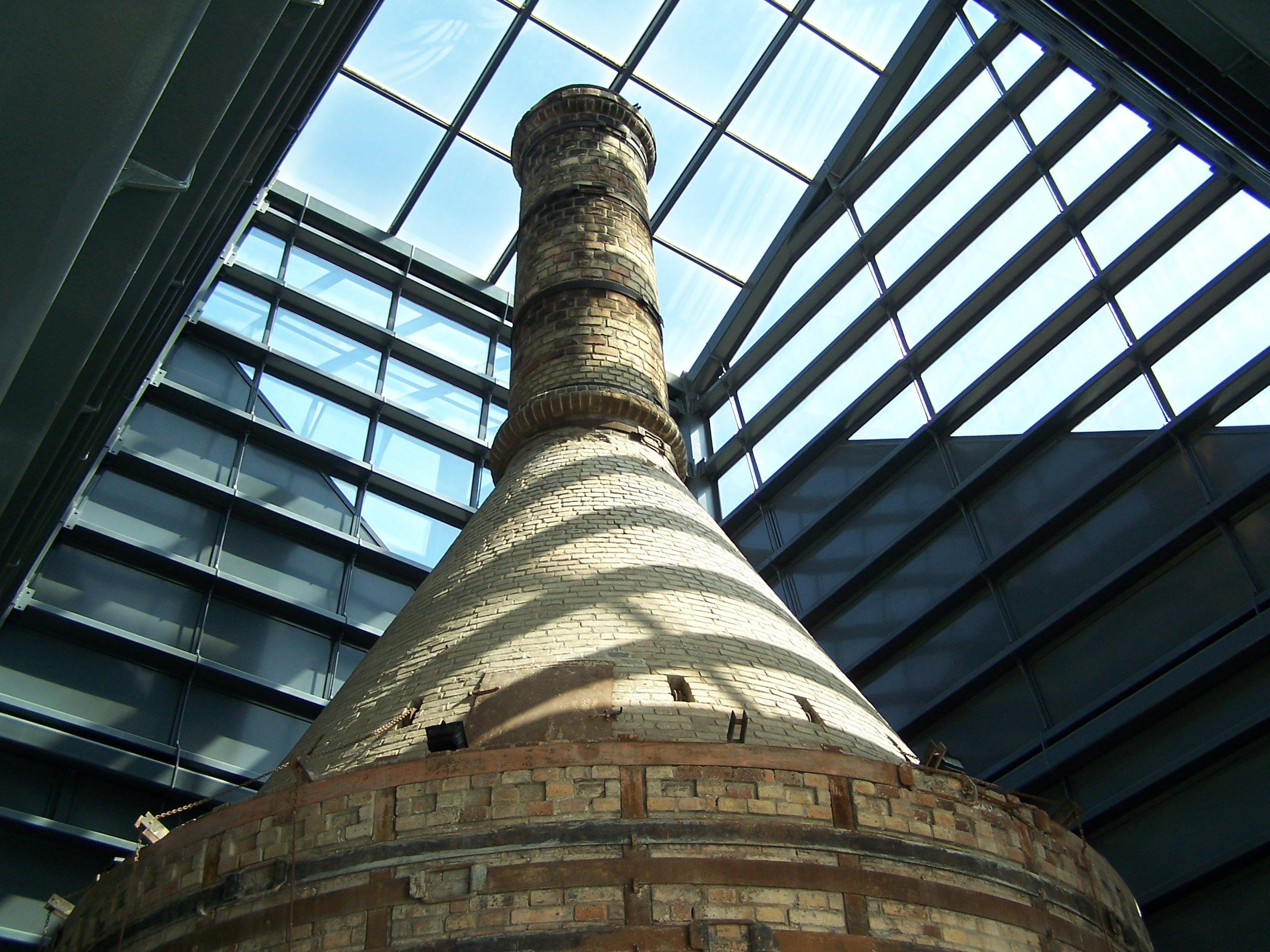 Museu da Cerâmica - Forno 18 - II /